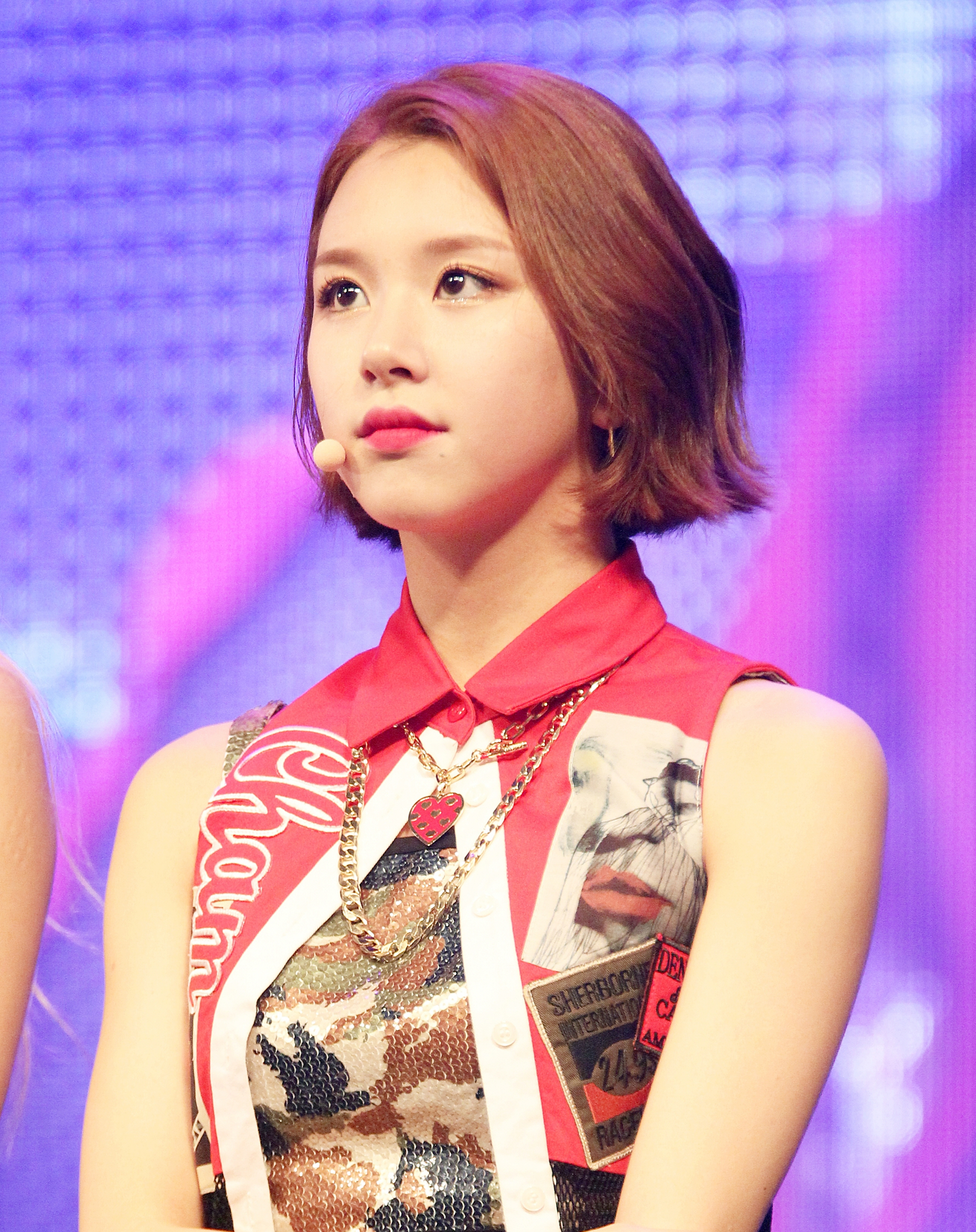 151020 트와이스 - 데뷔 쇼케이스 TWICE - Debut Showcase